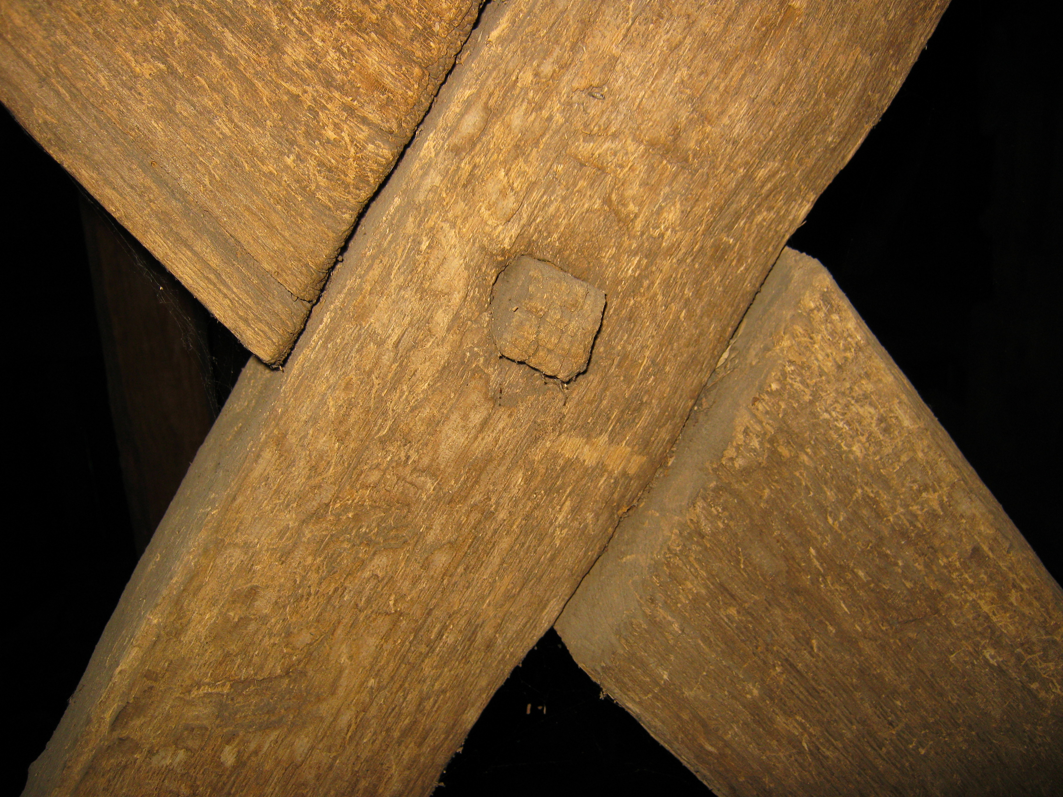 Тибель у дерев'яній архітектурній конструкції (дзвіниця церкви Святого Миколая у селі Колодне, Збаразький район, Тернопільська область, Україна)